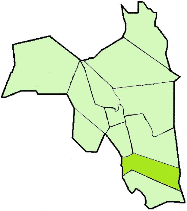 Lapinjärven kartta: Lapinkylän sijainti